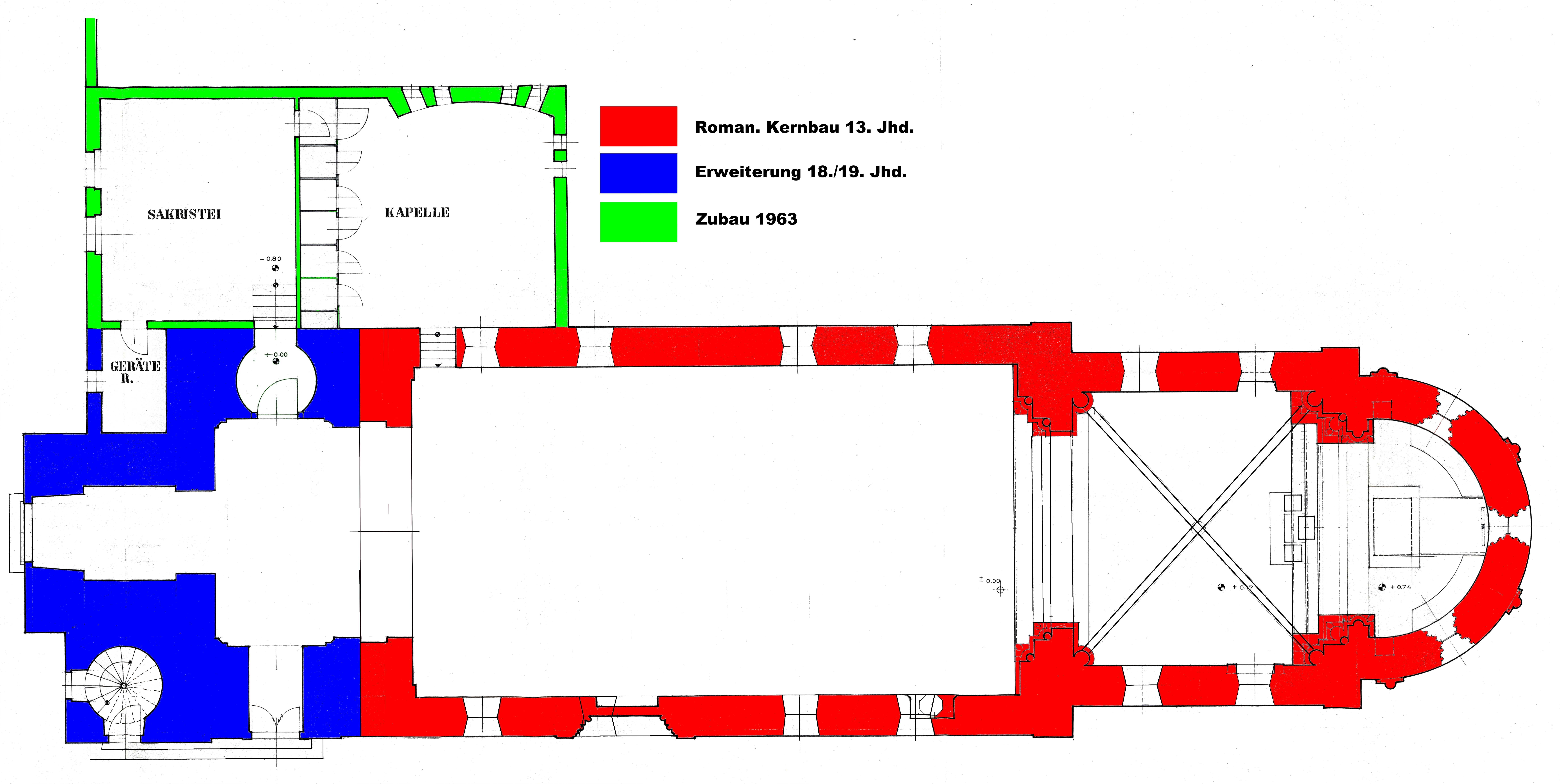 Grundriss der Pfarrkirche Schöngrabern mit Kennzeichnung der Bauabschnitte